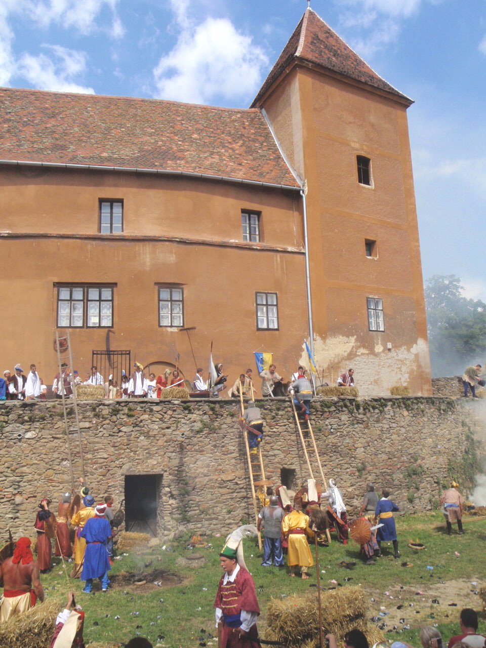 Historische Spiele "Félhold-Telihold" von Güns, 1532. Jurisich verteidigen die Burg gegen türkischen Truppen